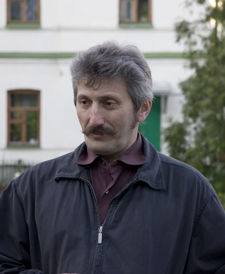 Кальницкий Михаил Борисович, исследователь киевской старины